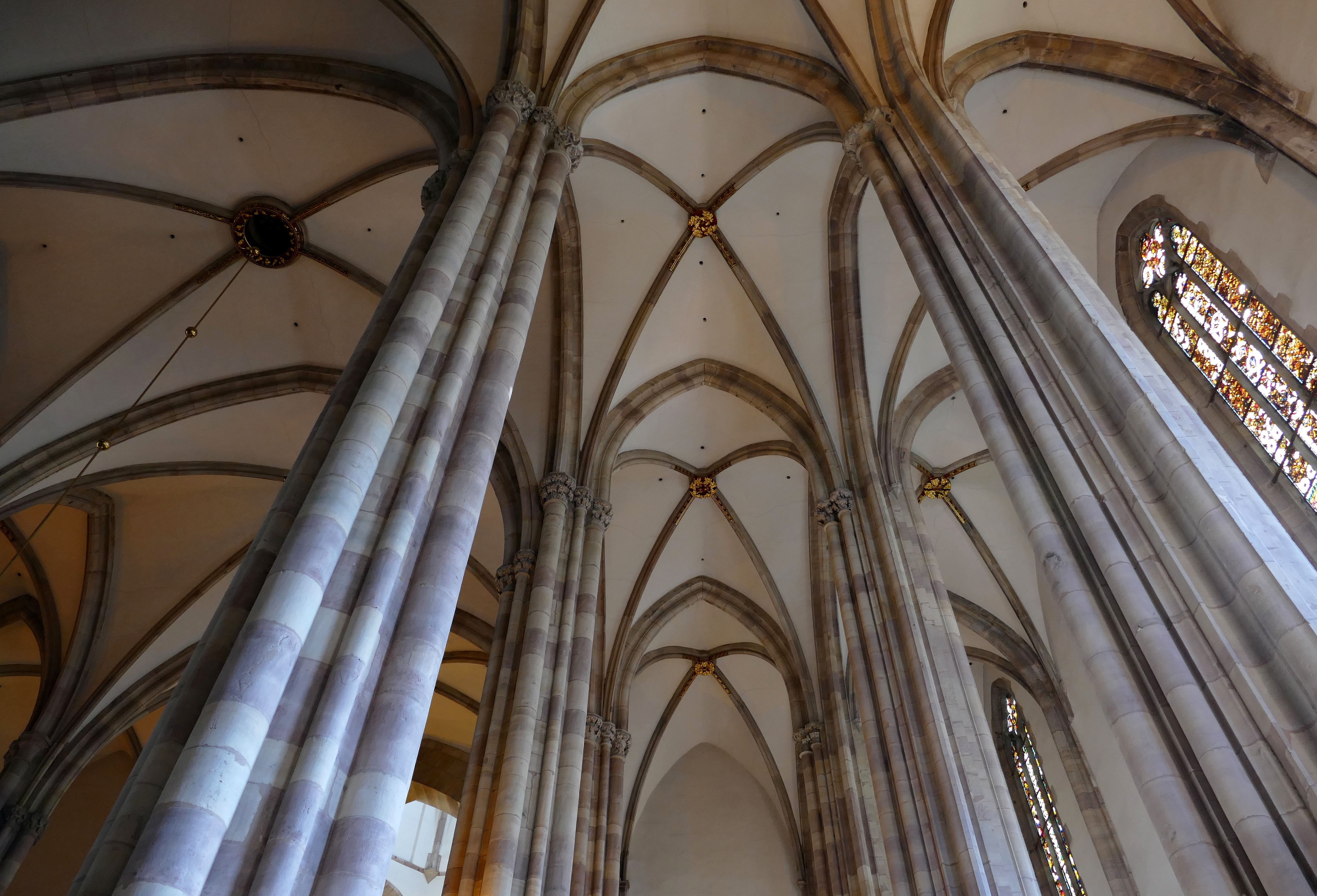 Alsace, Bas-Rhin, Église protestante Saint-Thomas de Strasbourg, 4 rue Martin-Luther (PA00085032).Voûtes de la nef gothique (église-halle ou Hallenkirche: les bas-côtés sont de la même hauteur que la nef.)